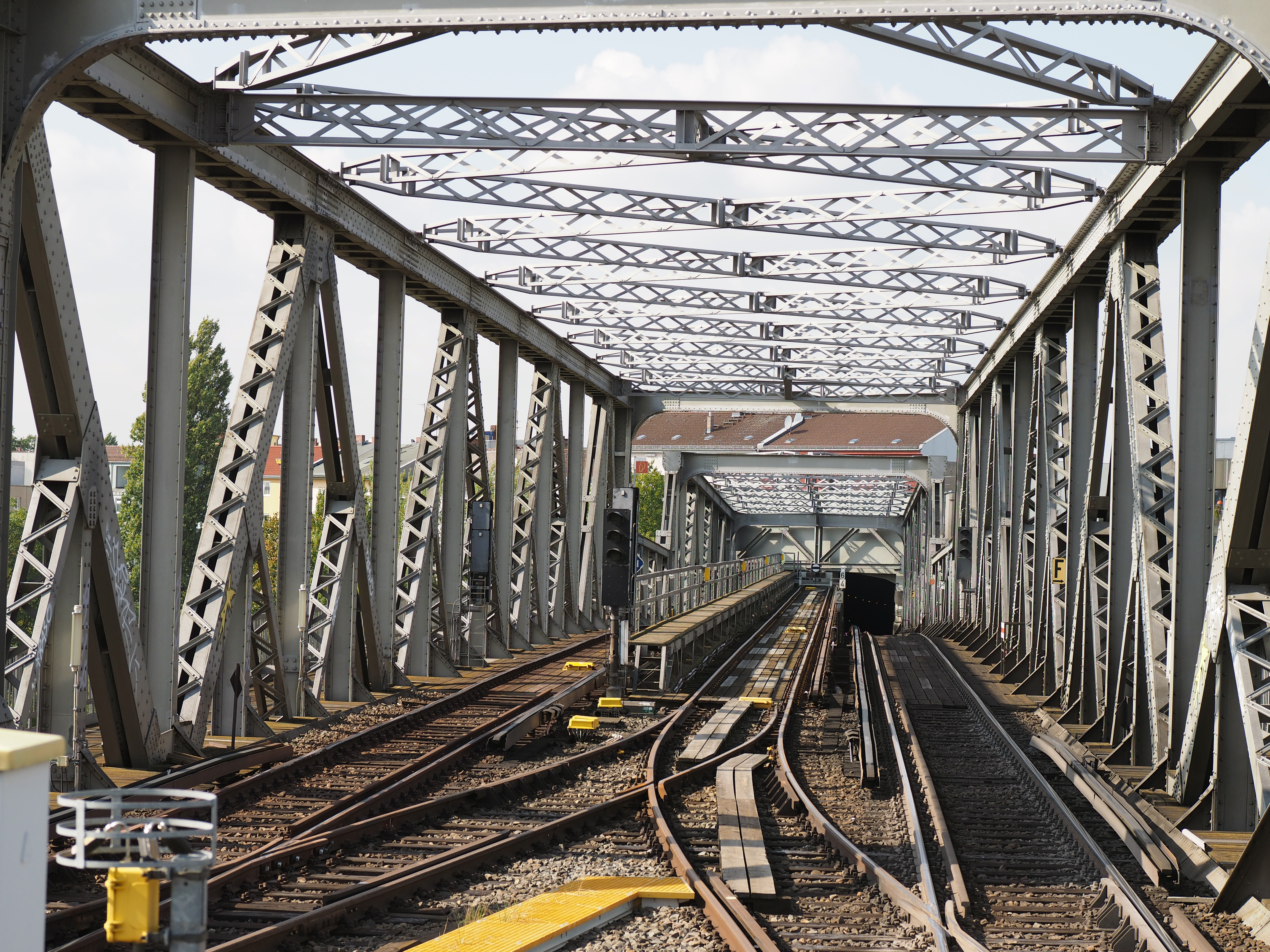 Blick vom oberen Bahnsteig Gleisdreieck nach Westen